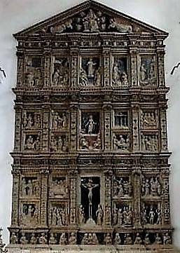 Retablo di Giandomenico Gagini, chiesa della Santissima Trinità (Badia) di Petralia Sottana